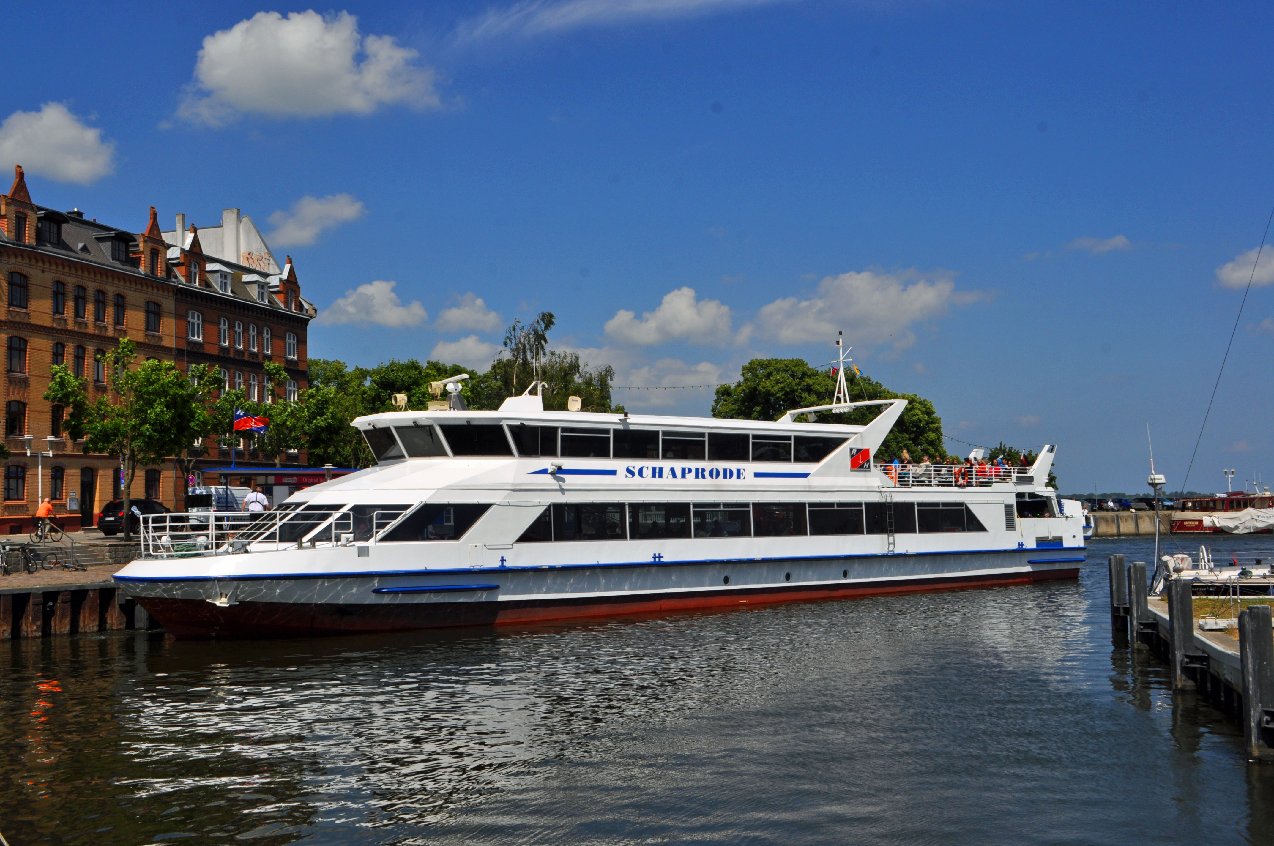 Die SCHAPRODE der Weißen Flotte in Stralsund im Juni 2013 im Stralsunder Hafen.